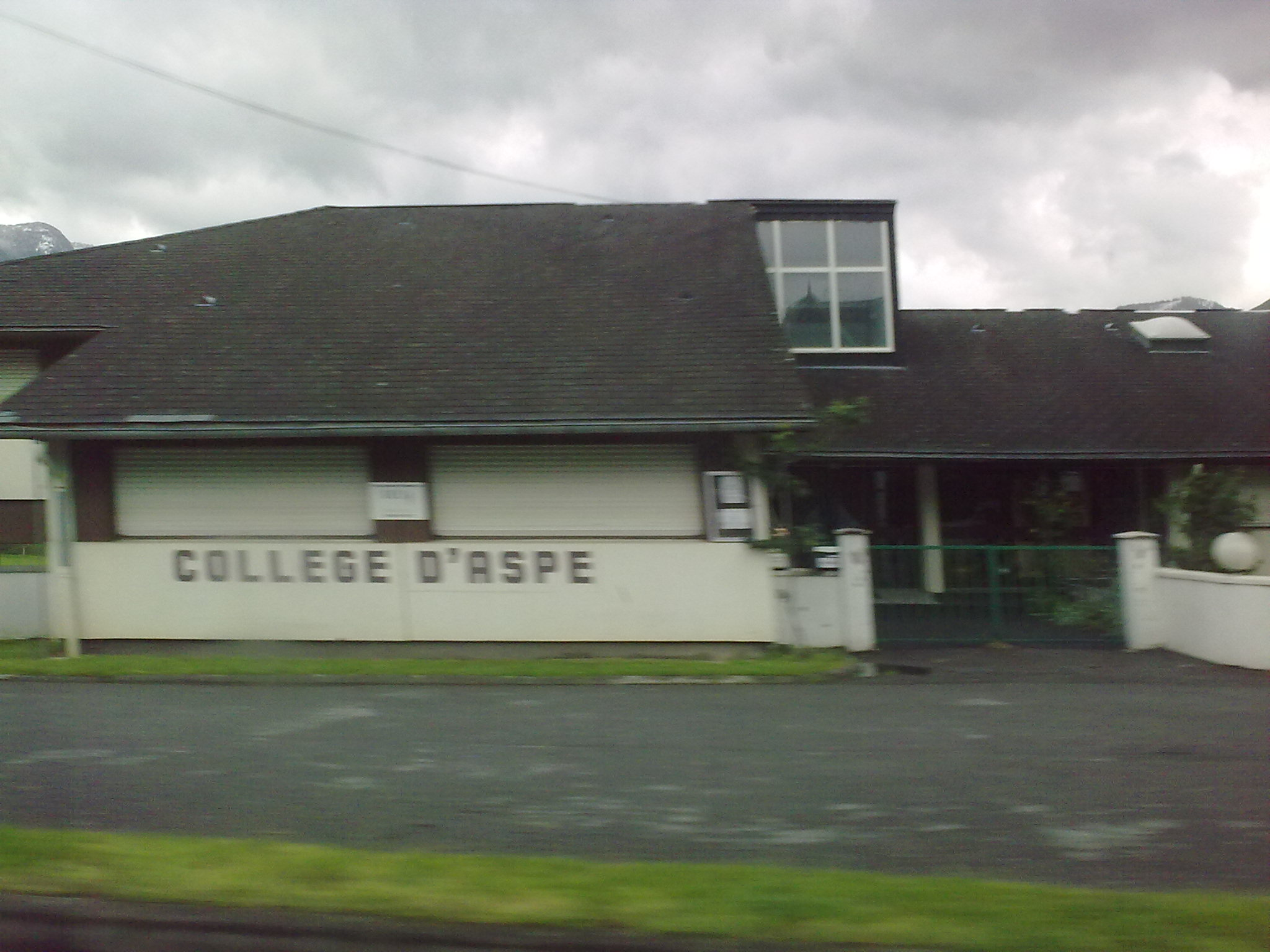 Bedous, France